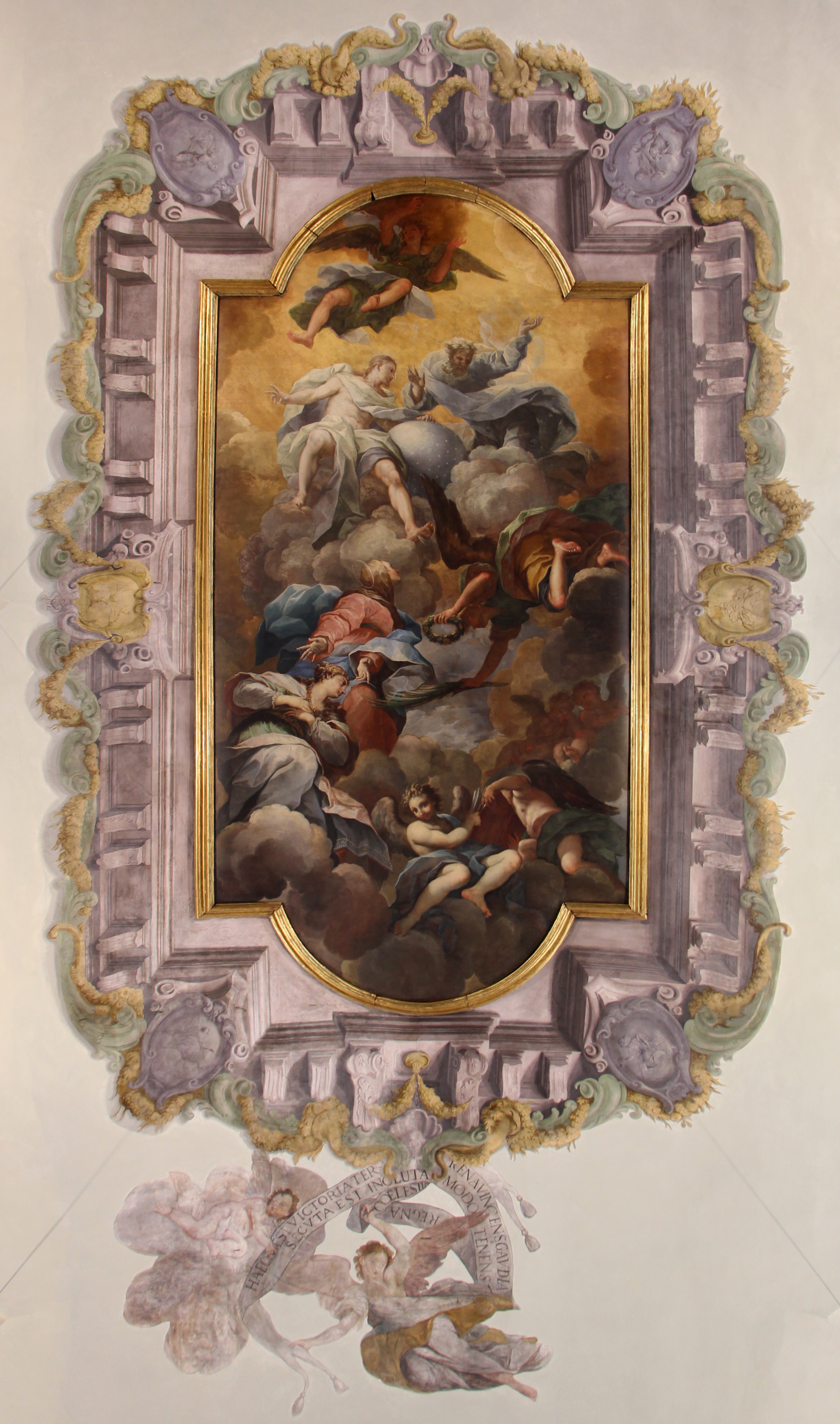 Villa La Quiete, Firenze